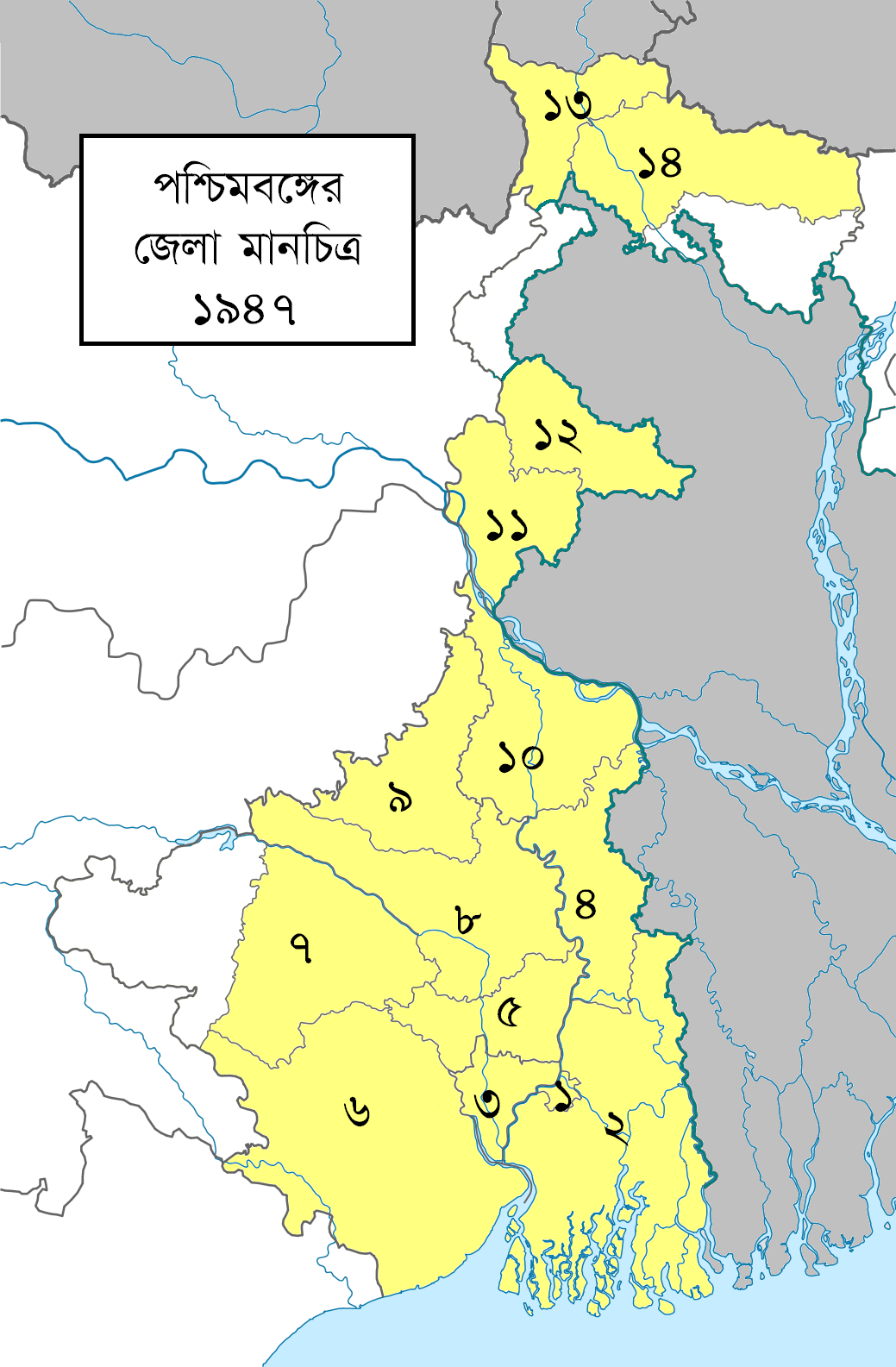 পশ্চিমবঙ্গের জেলা মানচিত্র, ১৯৪৭ (সংখ্যাভিত্তিক)